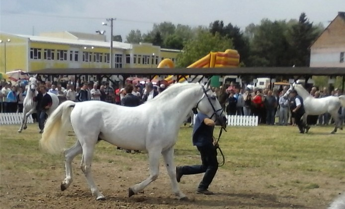 16. Međužupanijska stočarska izložba i Sajam Slavonski Brod 2013.